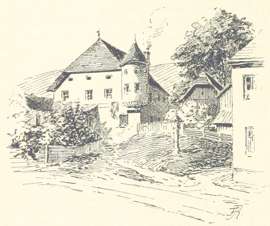 Schloss Aichet (Aichetschlössl) nach einer Zeichnung Franz Kulstrunks. Originalbeschreibung: Das Aichetschlössel. Von F. Kulstrunk. Angaben der British Library auf Flickr: Image taken from page 218 of 'Heiṃatkunde von Steyr, etc' Image taken from: Title: "Heiṃatkunde von Steyr, etc" Author: ROLLEDER, Anton. Shelfmark: "British Library HMNTS 10215.i.5." Page: 218 Place of Publishing: Steyr Date of Publishing: 1893 Issuance: monographic Identifier: 003140758